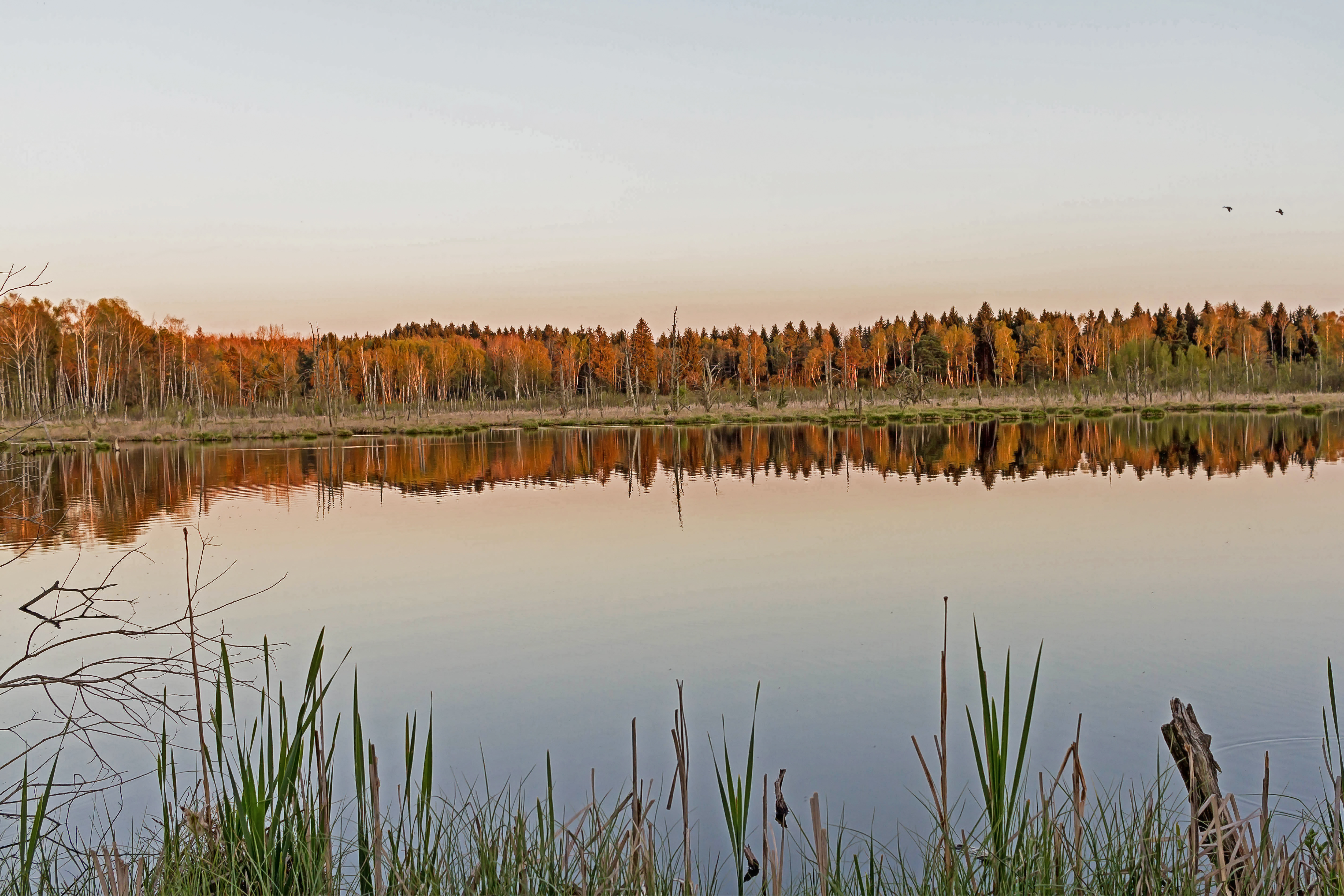 Naturschutzgebiet Schwenninger Moos – Das Schwenninger Moos befindet sich 705 m ü. NN. auf der Baar, am Südrand der großen Kreisstadt Villingen-Schwenningen. Es ist ein etwa drei Quadratkilometer großes Moorgebiet.